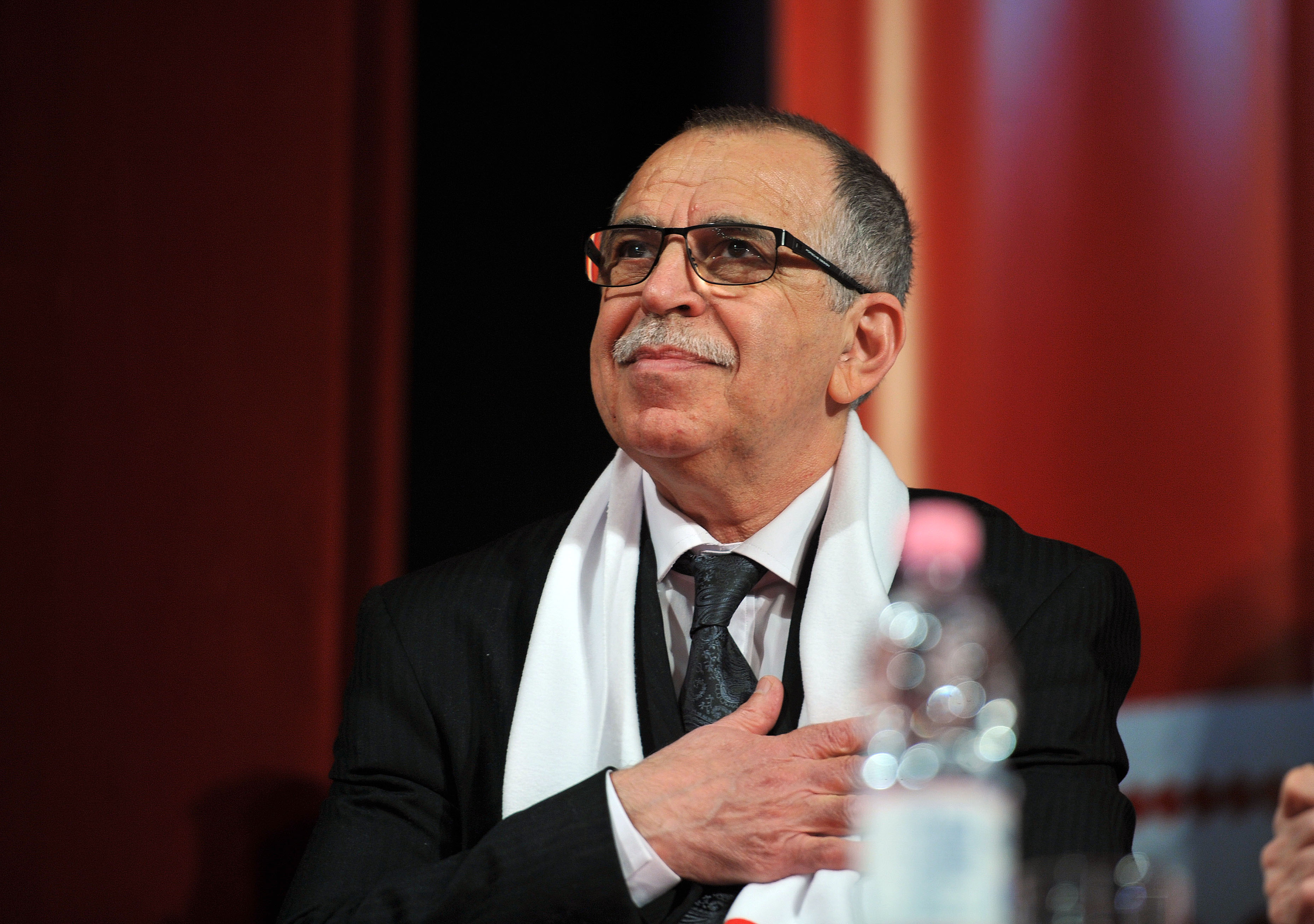 Lansarea candidatului Aliantei Electorale PSD – UNPR – PC la presedintia Consiliului Judetean Arges - 006